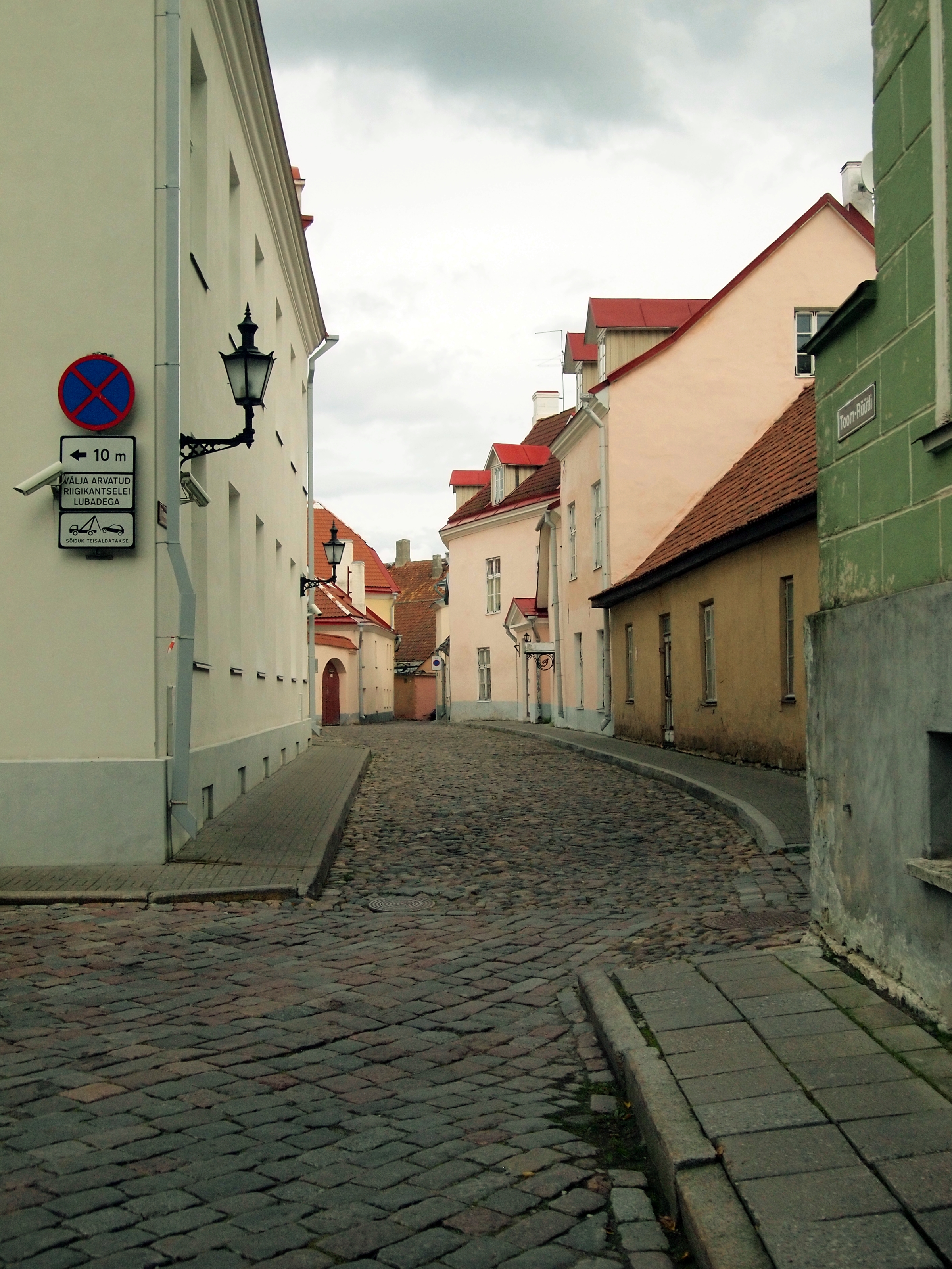 Toom-Rüütli tänav Tallinnas